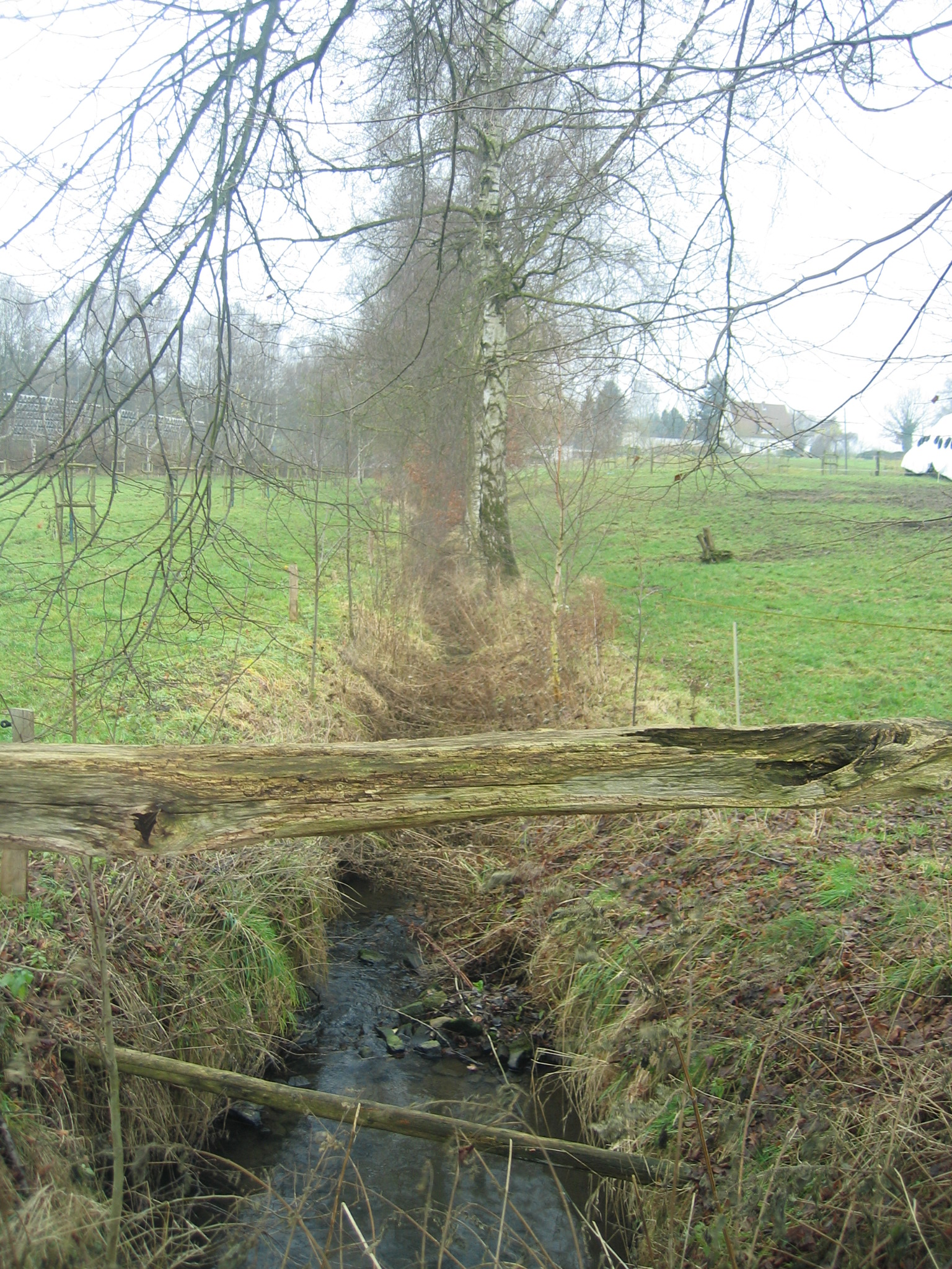 Der Darmühlenbach im Oberlauf bei Rödinghausen-Bieren. Der Bach verläuft hier durch ein extensiv genutztes Wiesental und nimmt an dessen Ende den Grenzbach auf, um dann weiter Richtung Gut Böckel zu fließen, wo er zur Graft aufgestaut wird.